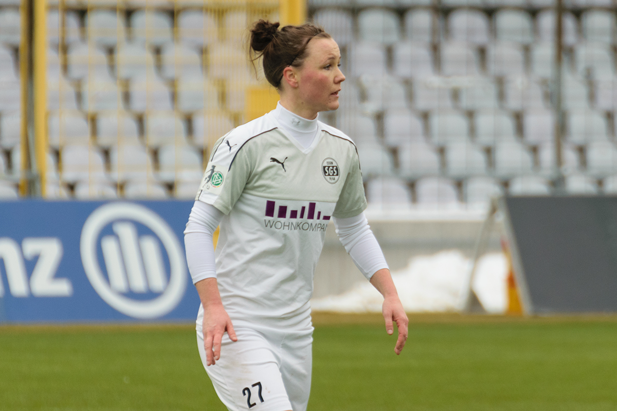 Marina Hegering at FC Bayern vs SGS Essen